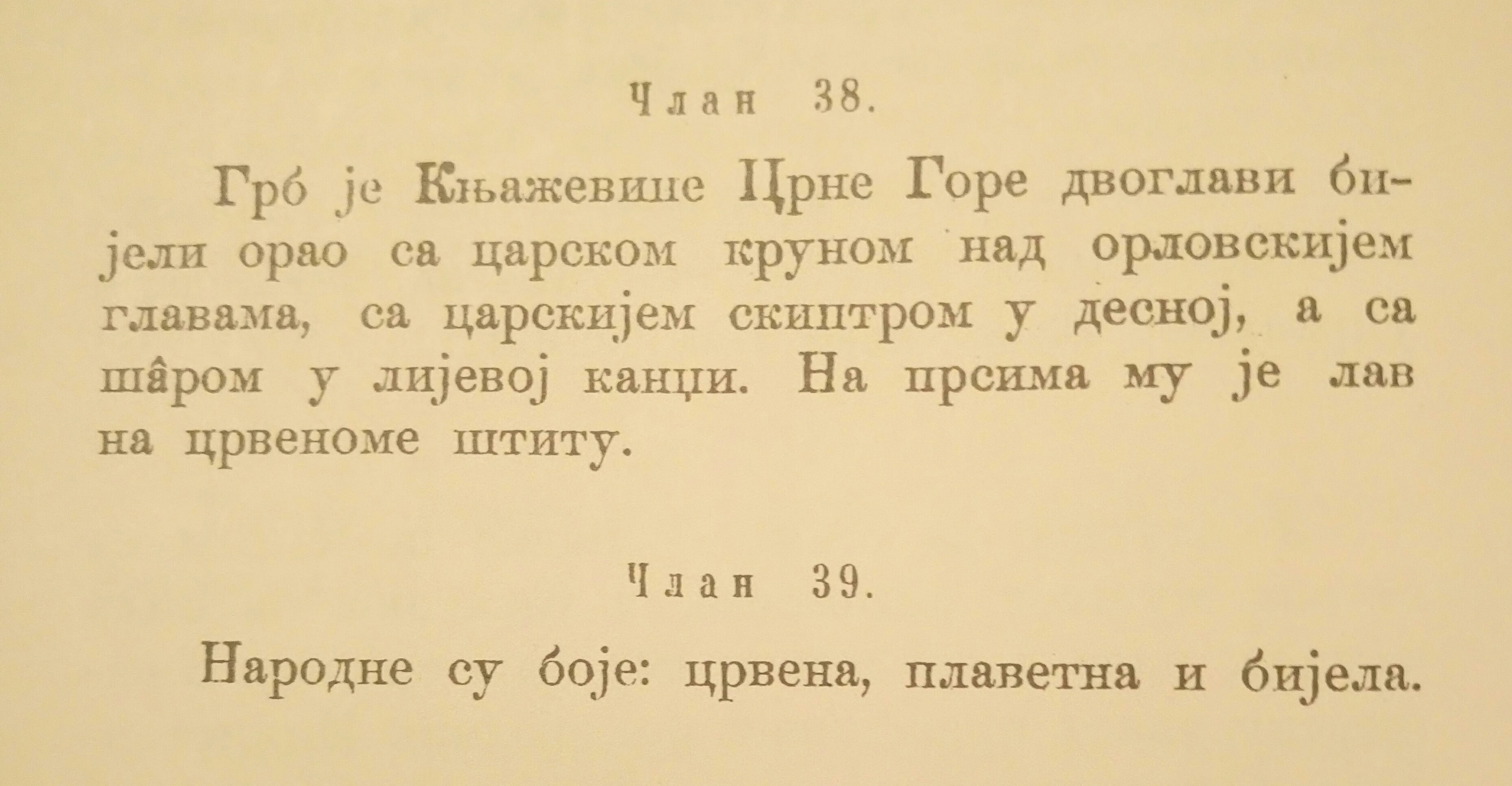 Srpskohrvatski / српскохрватски: Članak 38. i 39. o grbu i narodnim bojama